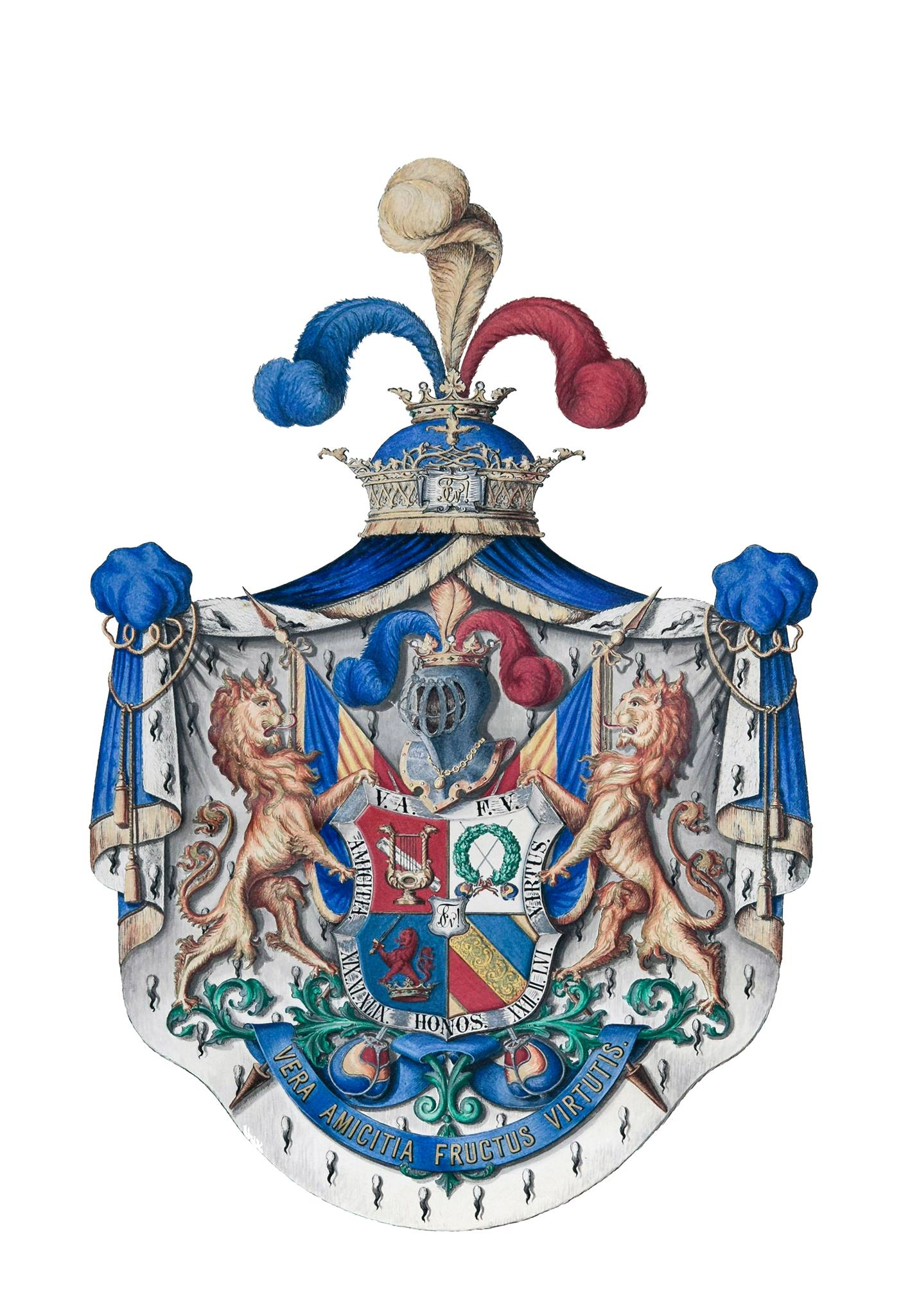 Wappen der Landsmannschaft Schottland Tübingen, 1905